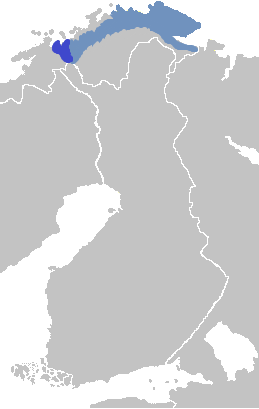 Tumma = virallinen kieli vaalea = vähemmistö kieli